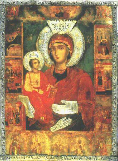 Ikone der Gottesmutter Maria mit 3 Händen aus Kloster Trojan / Bulgarien